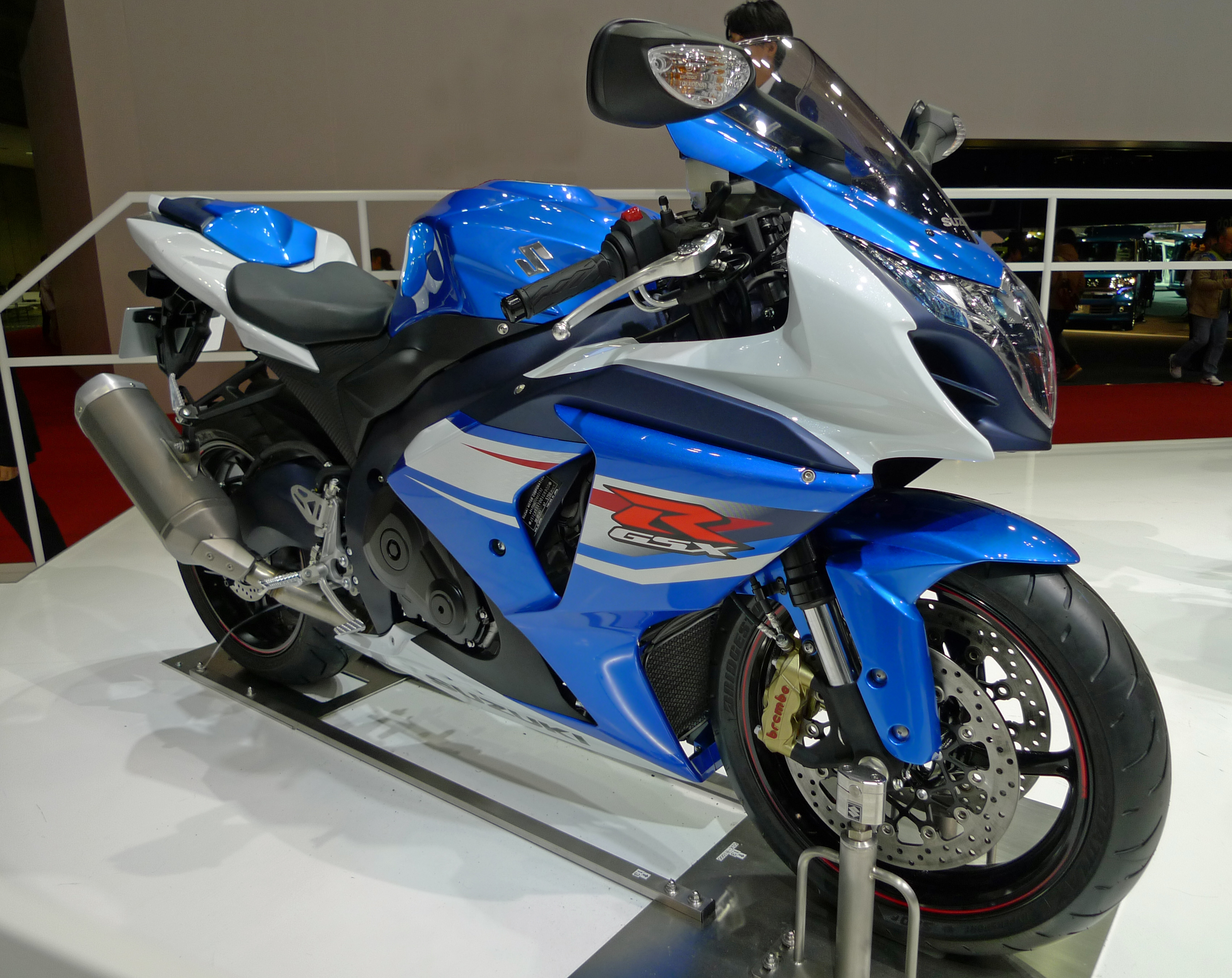 スズキ・GSX-R1000 2012 東京モーターショーにて撮影